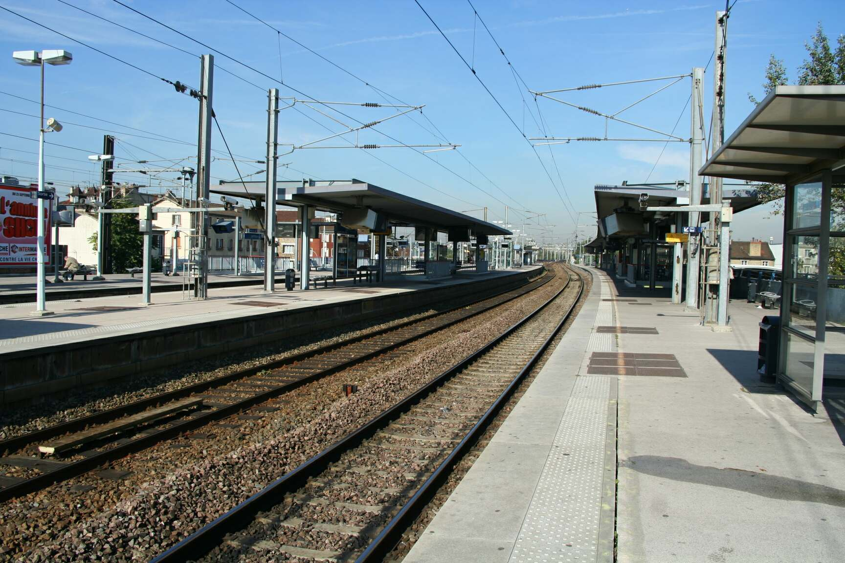 Gare de Sartrouville - Yvelines (France) - les quais